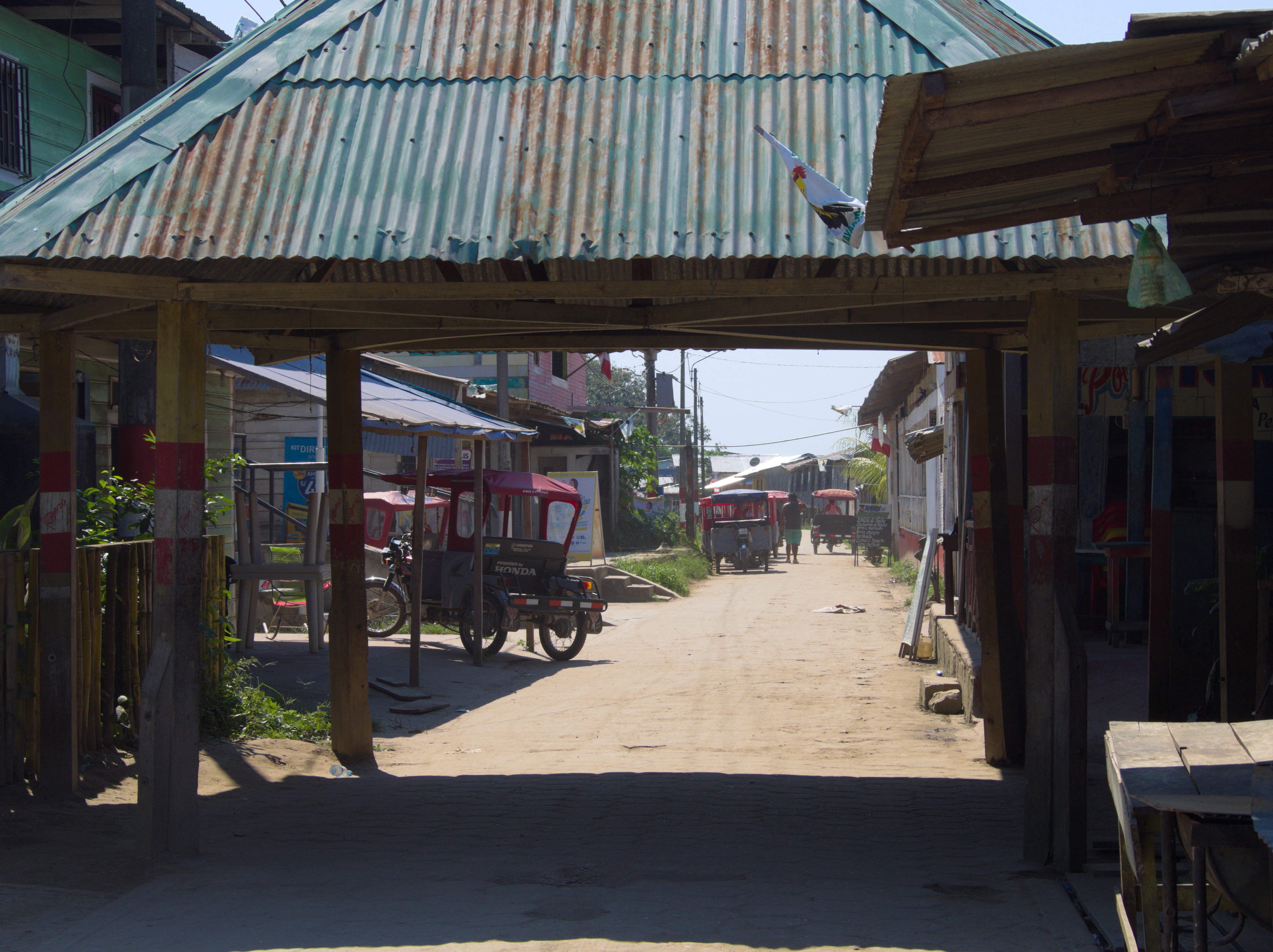 Santa Rosa, Peru: Hauptstraße durch den Ort